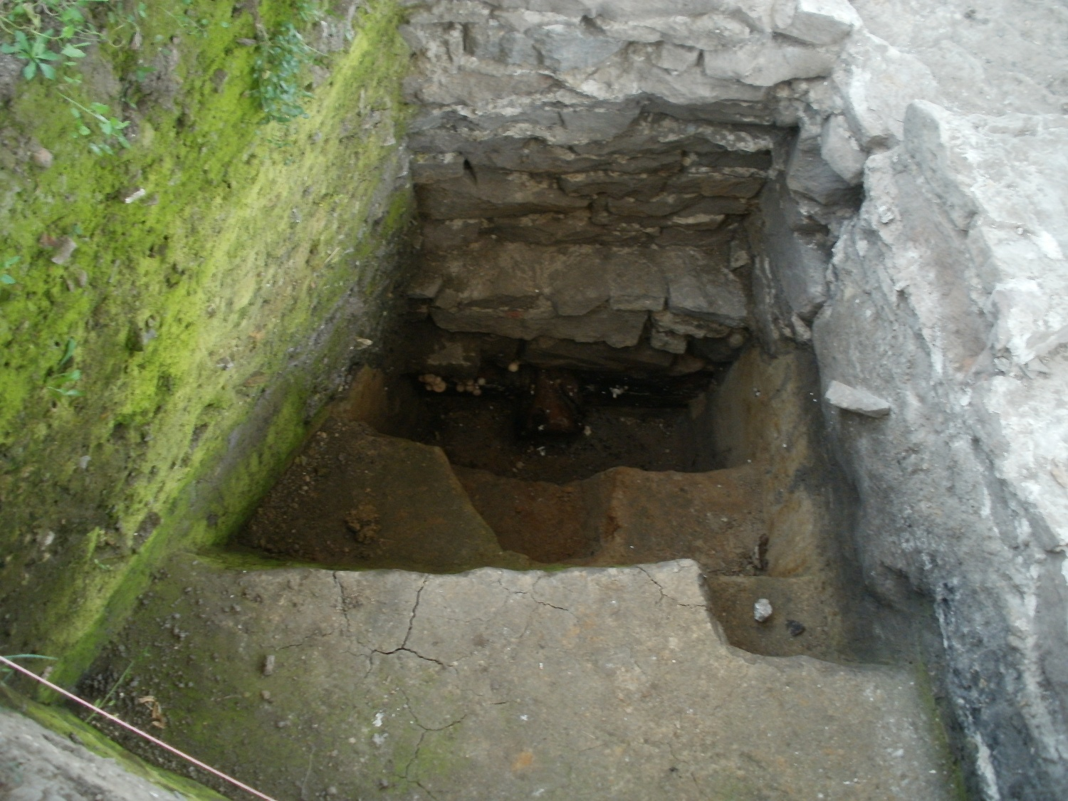 Ausgrabung auf Burg Wersau im Bereich der Hauptburg (November 2011): An der tiefsten Stelle ist der hölzerne Pfahlrost (um 1100) freigelegt worden